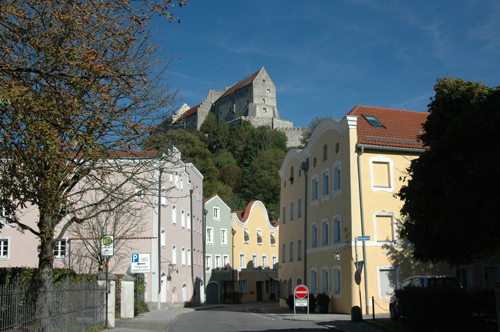 Die Hauptburg der Burg zu Burghausen von Süden, aus der Altstadt (Mautnerstr.) fotografiert. Burghausen Castle (main castle), pictured from the medieval part of town (south).